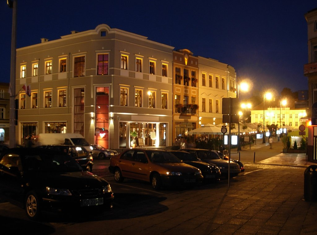 Ulica Mostowa w Bydgoszczy